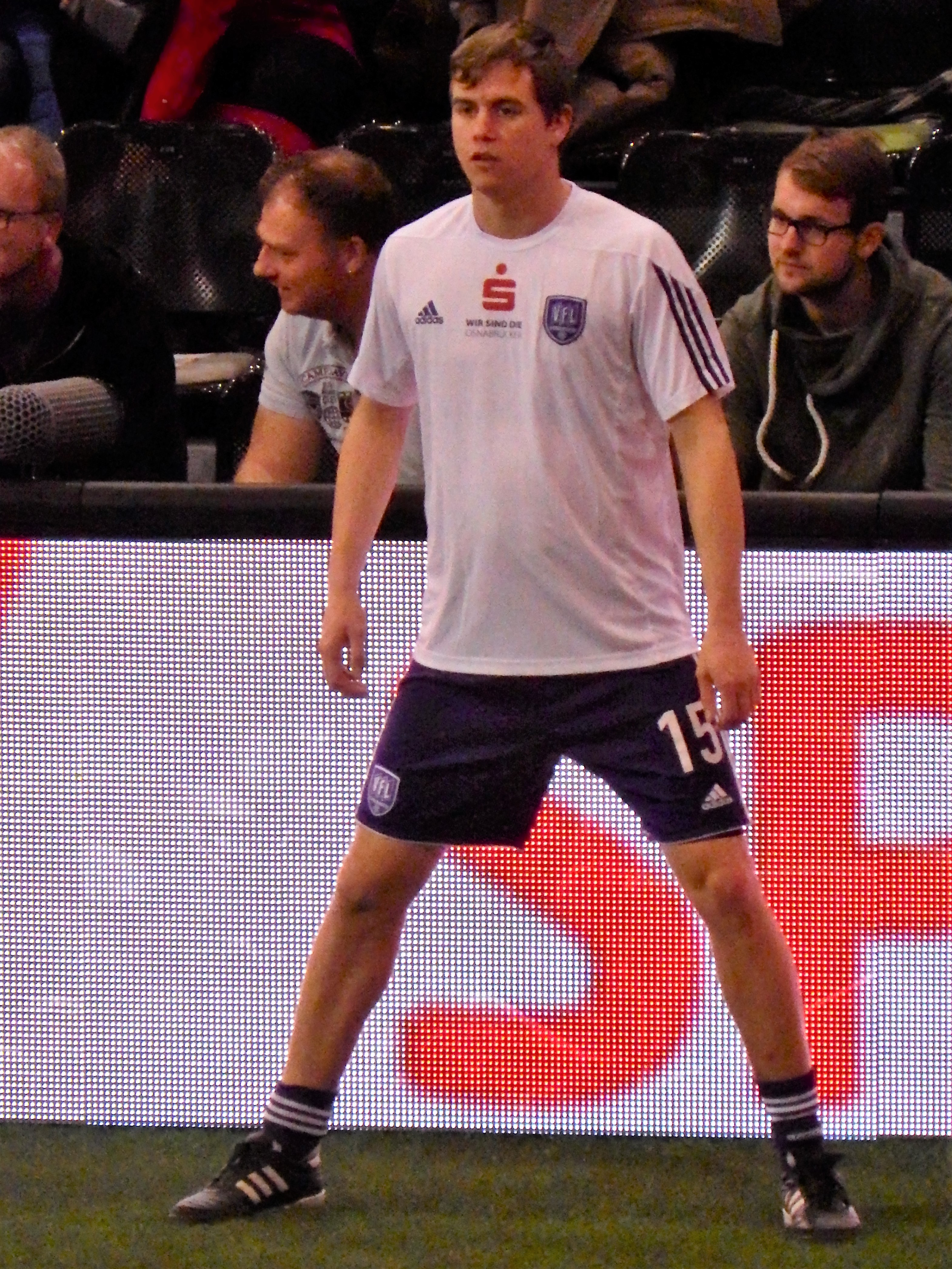 Maik Odenthal